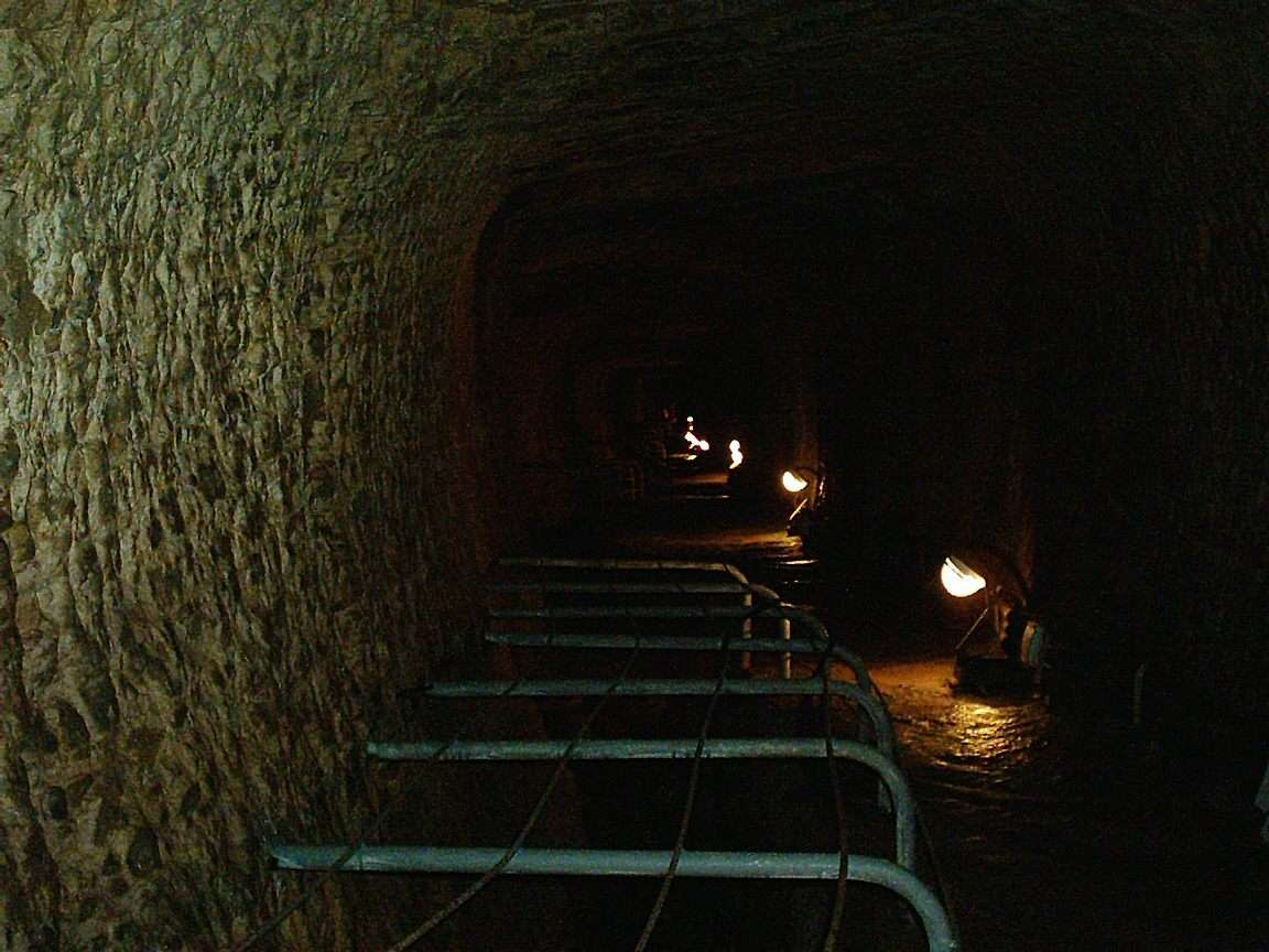 Eupalinos tunnel in Pythagorio, Samos. Copyright Ch. Eckert 2003. Published under terms and conditions of the FDL.